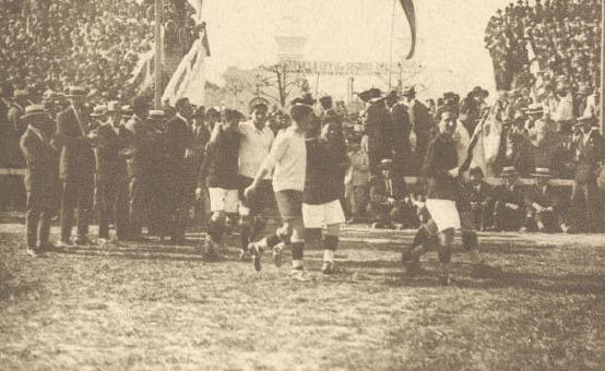 Salida de Uruguay de Chile en el Campeonato Sudamericano de 1926